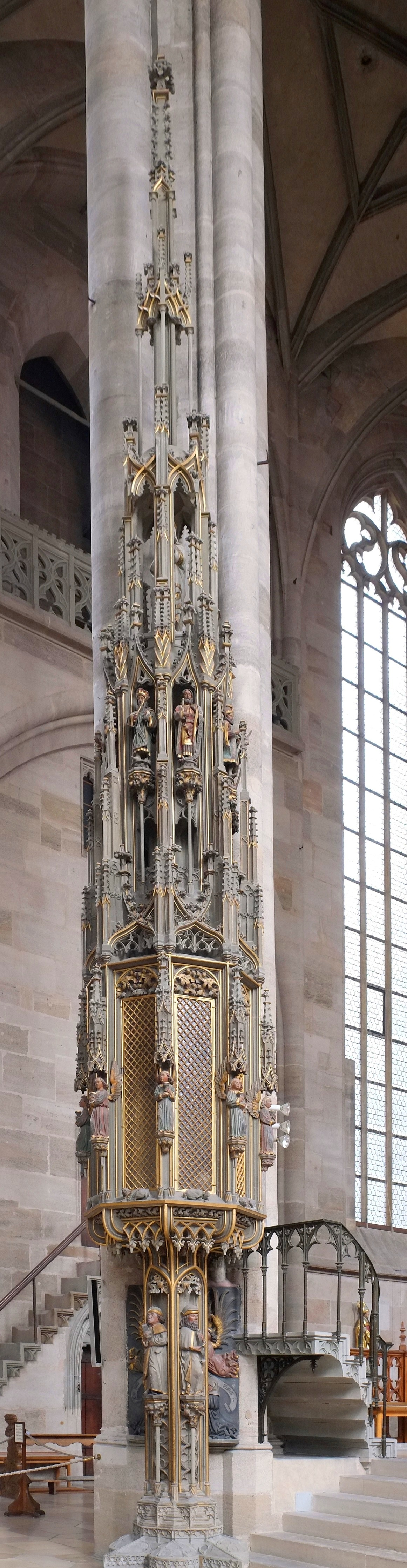 Sakramentshaus in der Kirche St. Georg in Dinkelsbühl im Landkreis Ansbach (Bayern, Deutschland)